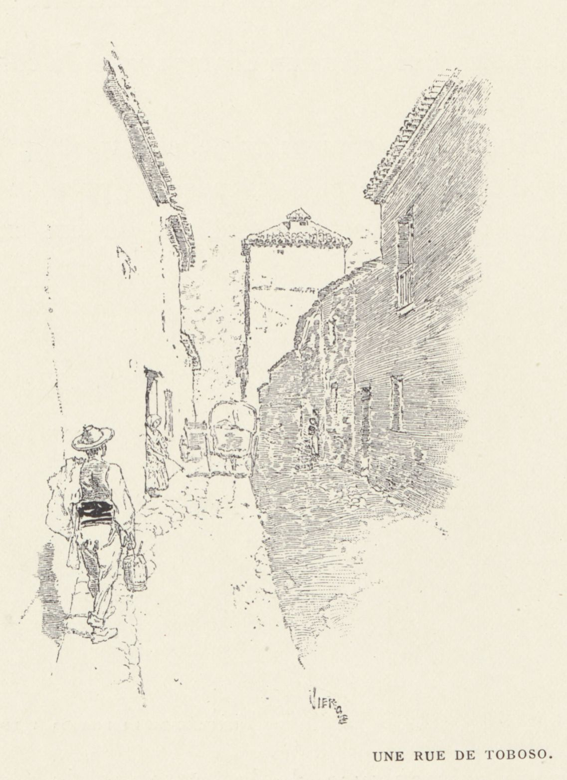 Une rue de Toboso.